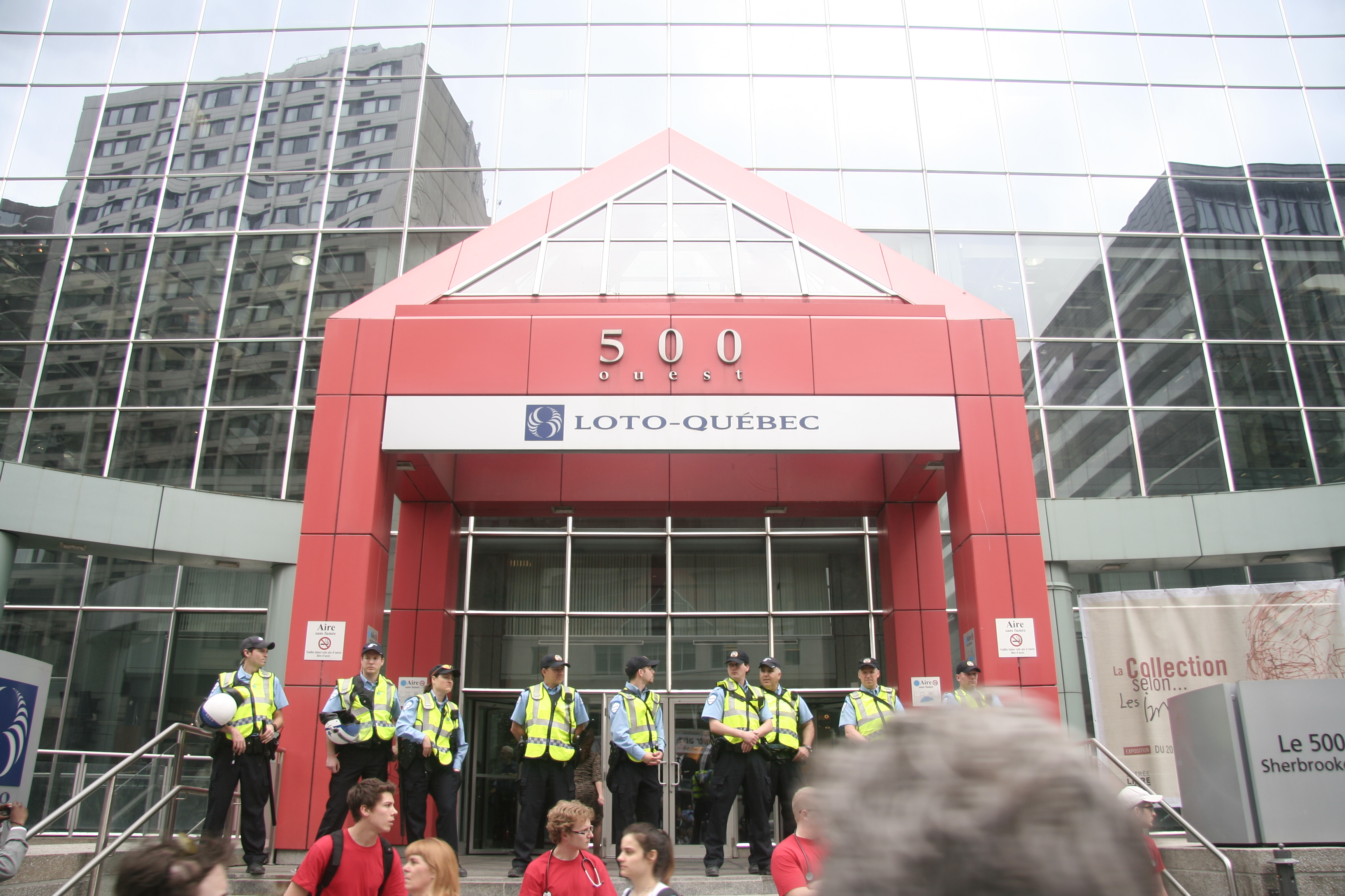 _MG_1983, Loto-Quebec headquarters in Montreal, blocked during the 2012 student protests./Bureau-chef de Loto-Québec à Montréal, durant les manifestations de 2012.